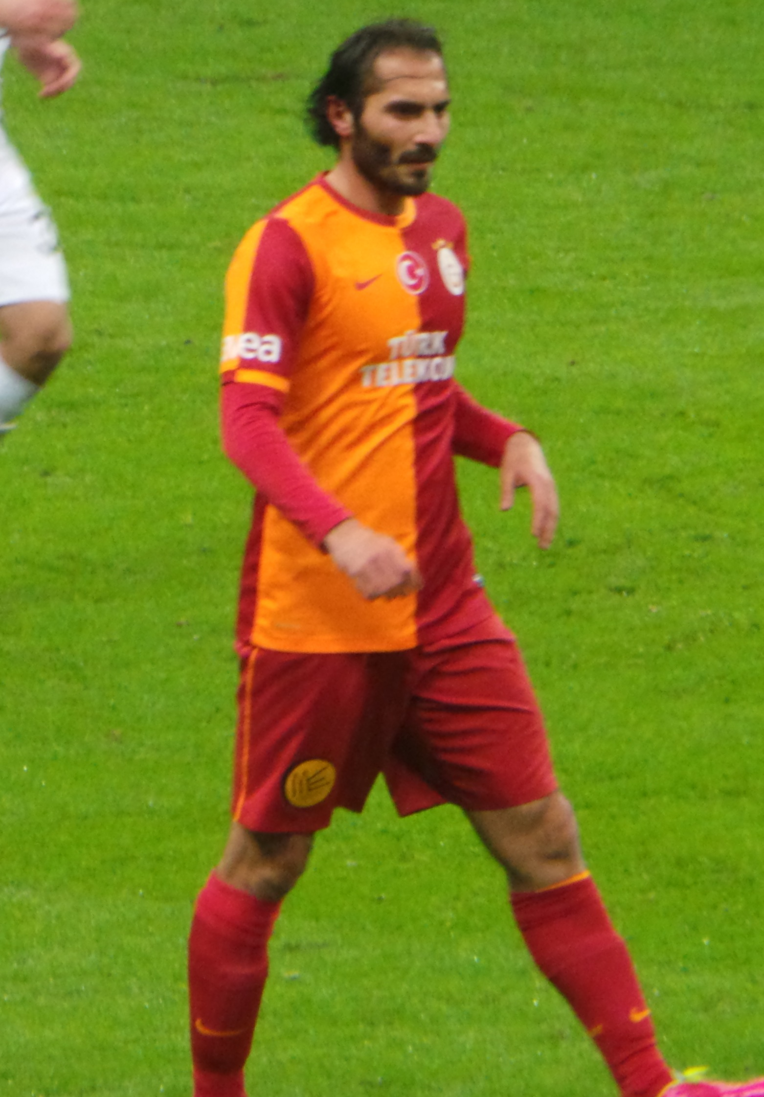 Hamit Altıntop